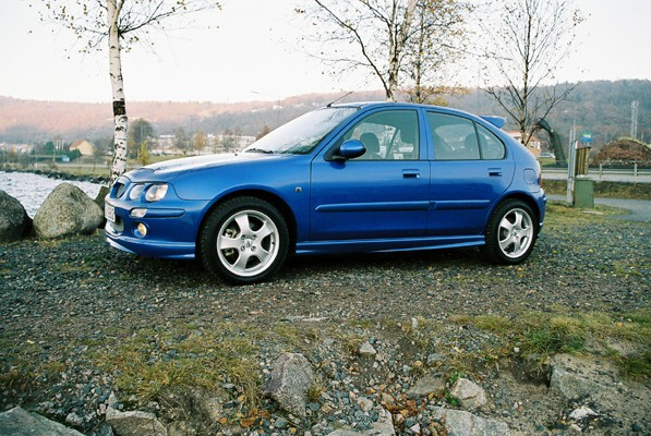 Trophy Blue MG ZR 160 årsmodell 2003, bilen har ej orginalfälgar Foto: Jan Nilsson